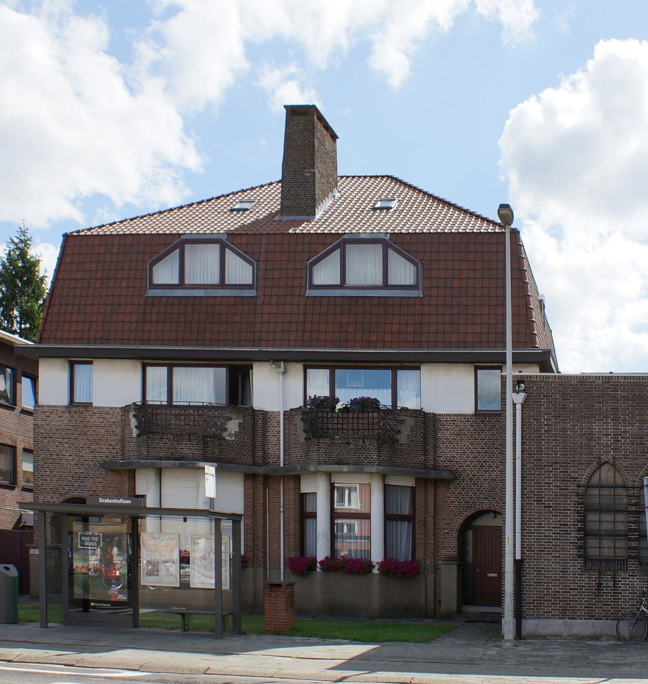 Boekenberglei 207-209, Deurne (Antwerpen). Burgershuis (links) en pastorie (rechts) gebouwd door Jef Huygh.